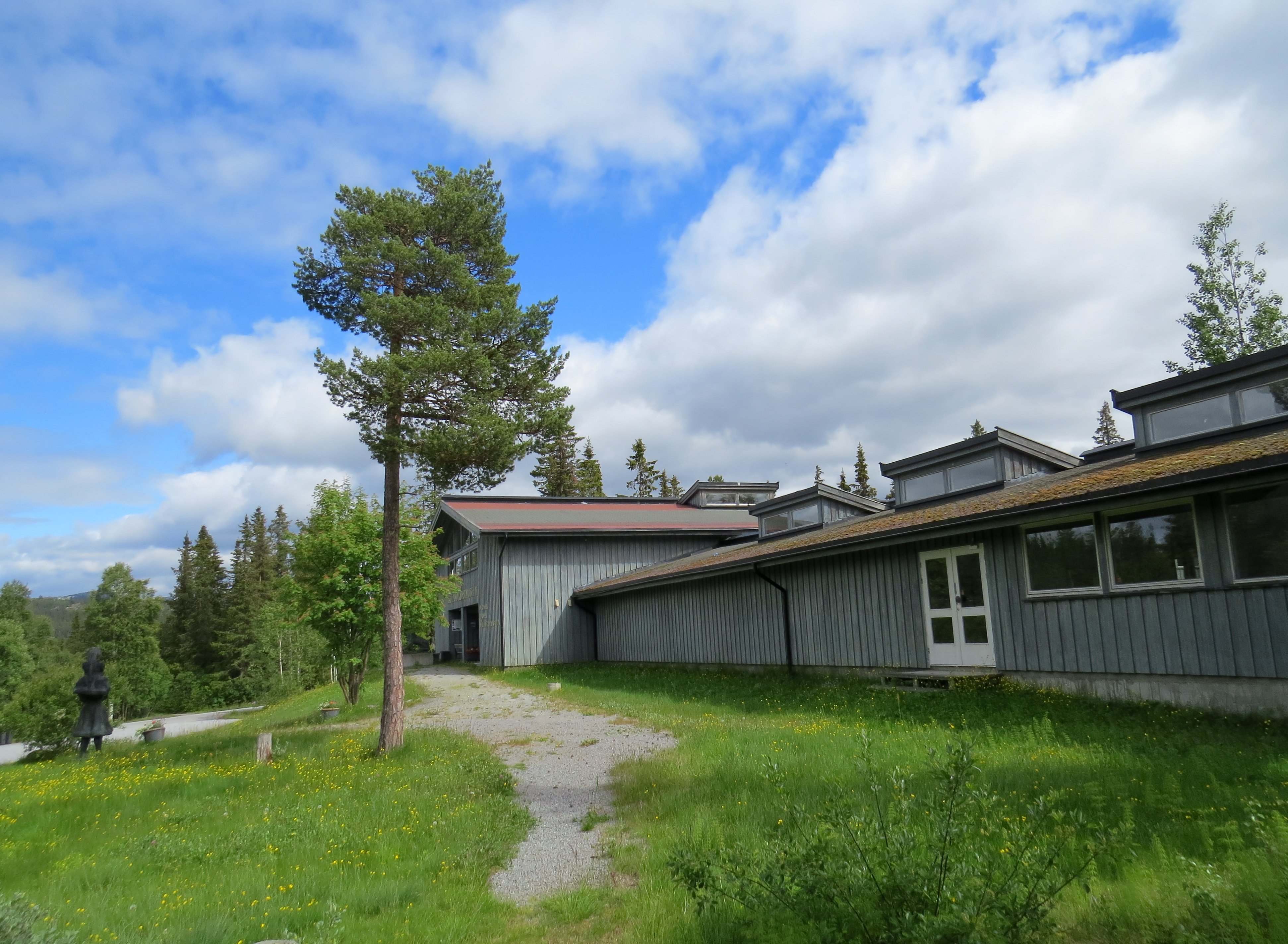 Rauland Kunstmuseum, Dyre Vaa, Tor Vaa, Svallaug Svalastoga, Telemarken, Norge